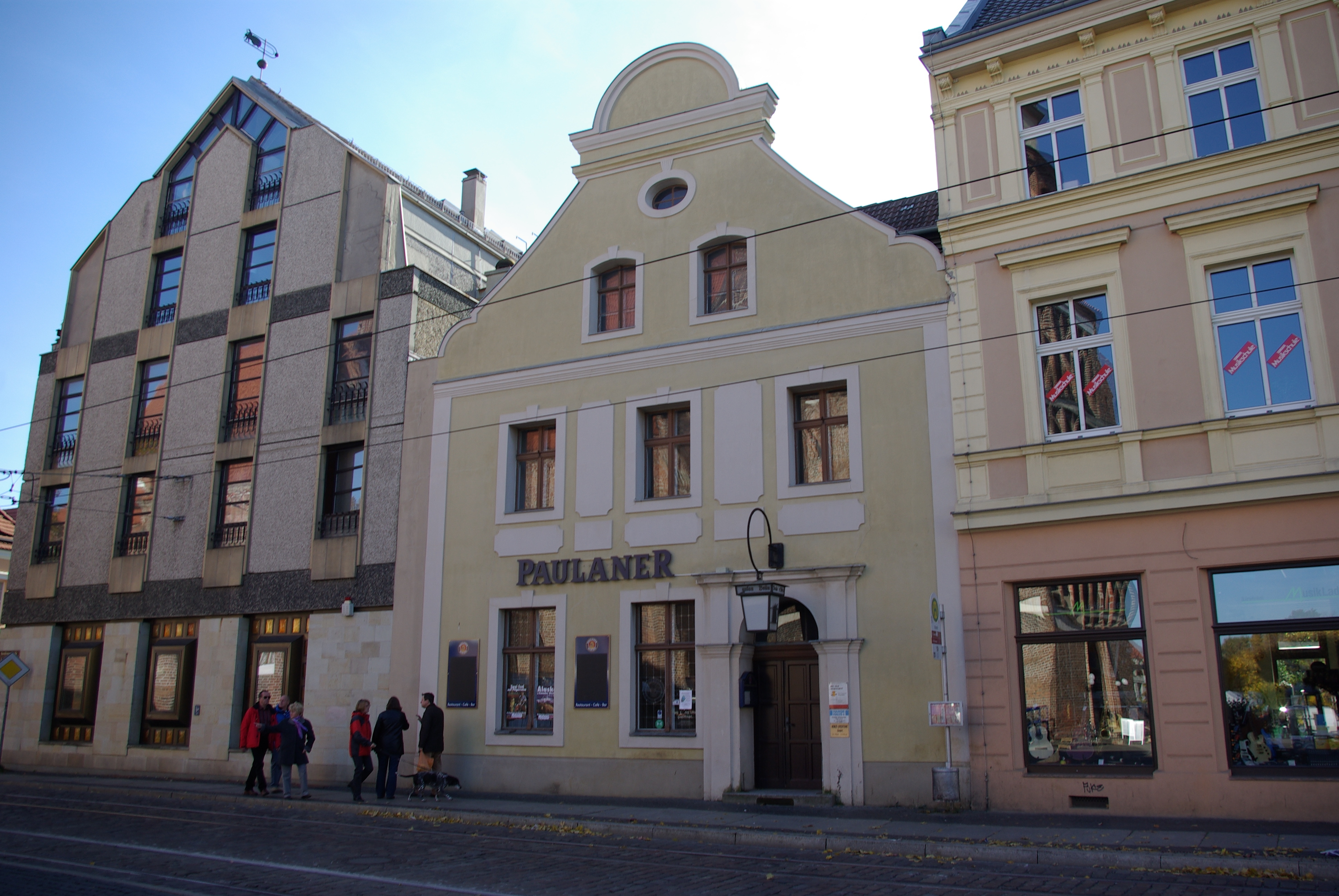 Cottbus in Brandenburg. Das haus in der Sandower Straße 57 steht unter Denkmalschutz.